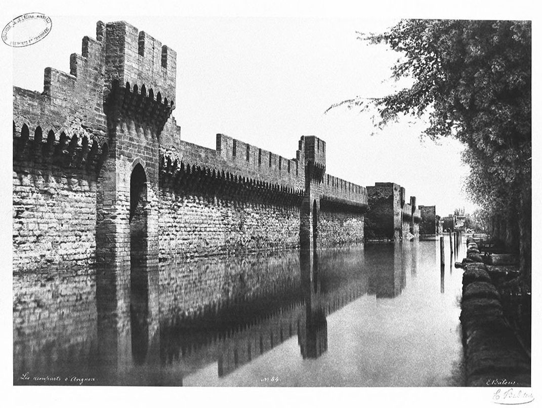 Photographie des remparts d'Avignon lors de l'inondation de 1856 par Édouard Baldus